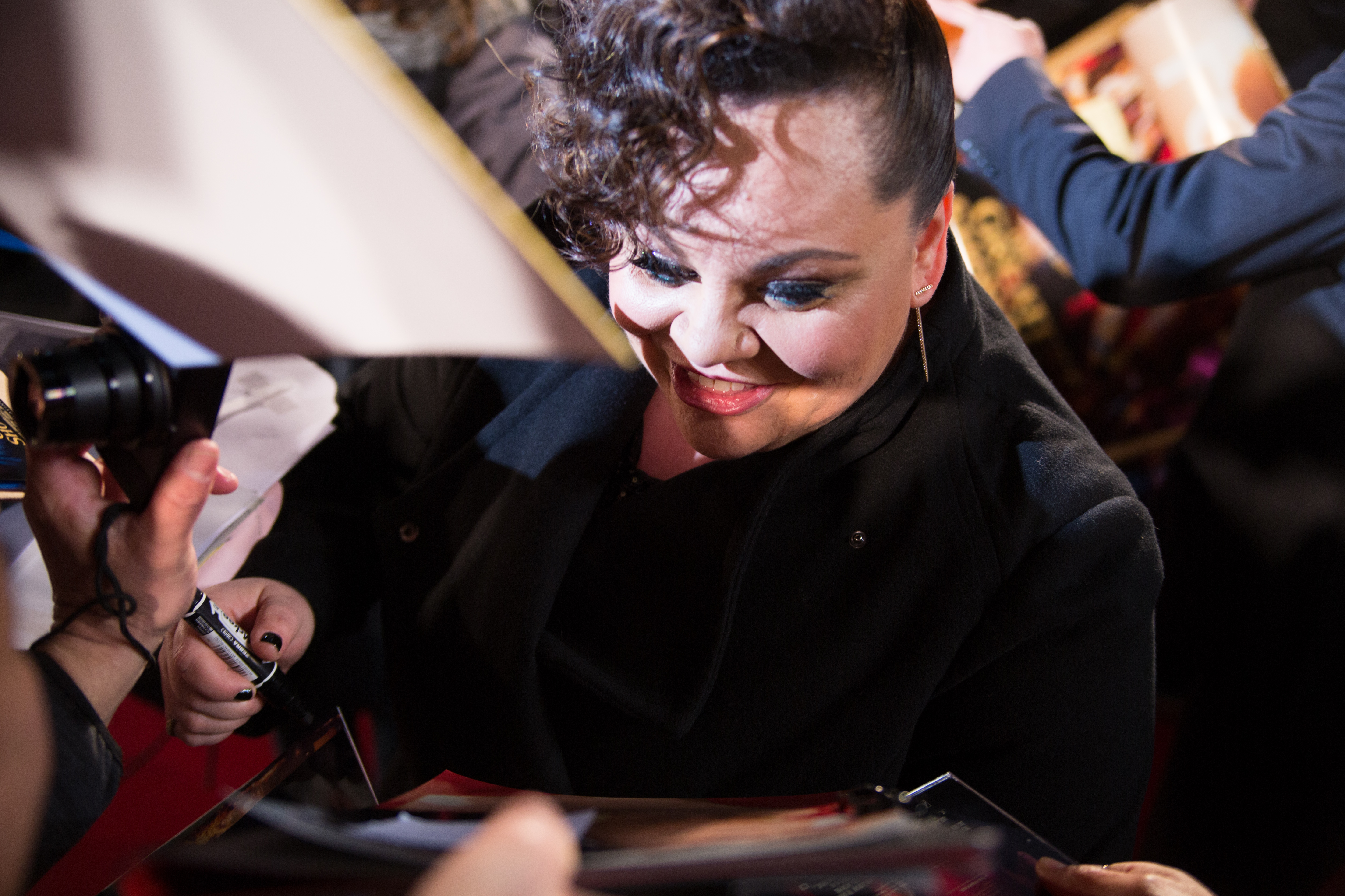 グレイテスト・ショーマン ジャパン・プレミア レッドカーペット キアラ・セトル